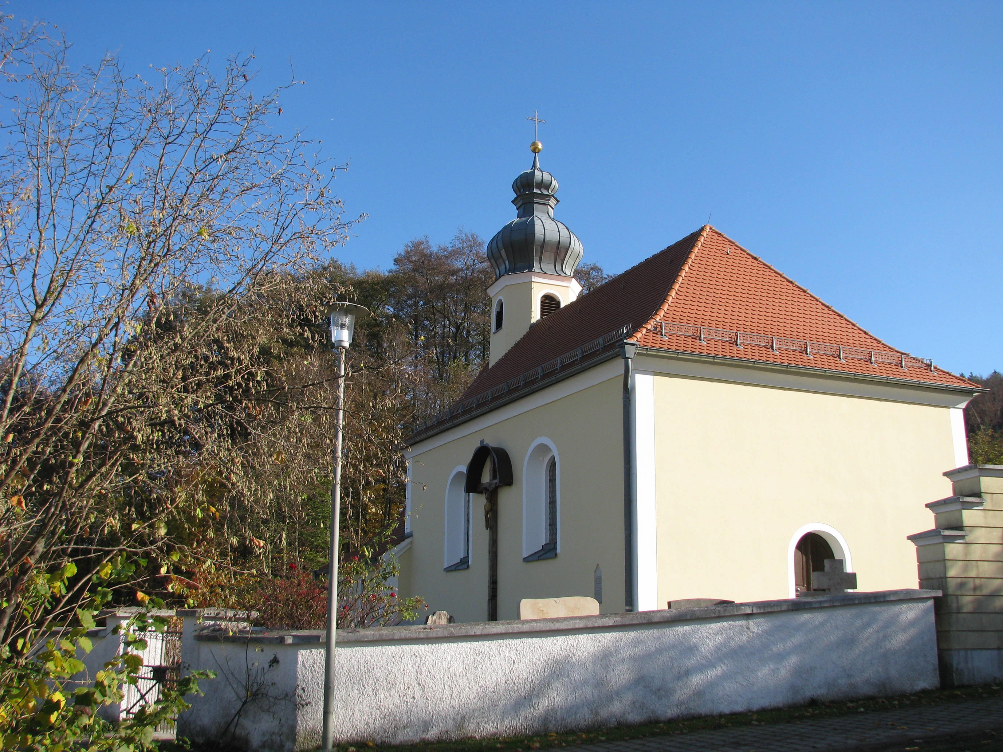 Lauterbach, Ortsteil von Freystadt im Landkreis Neumarkt in der Oberpfalz, Bayern, Kath. Kirche St. Willibald